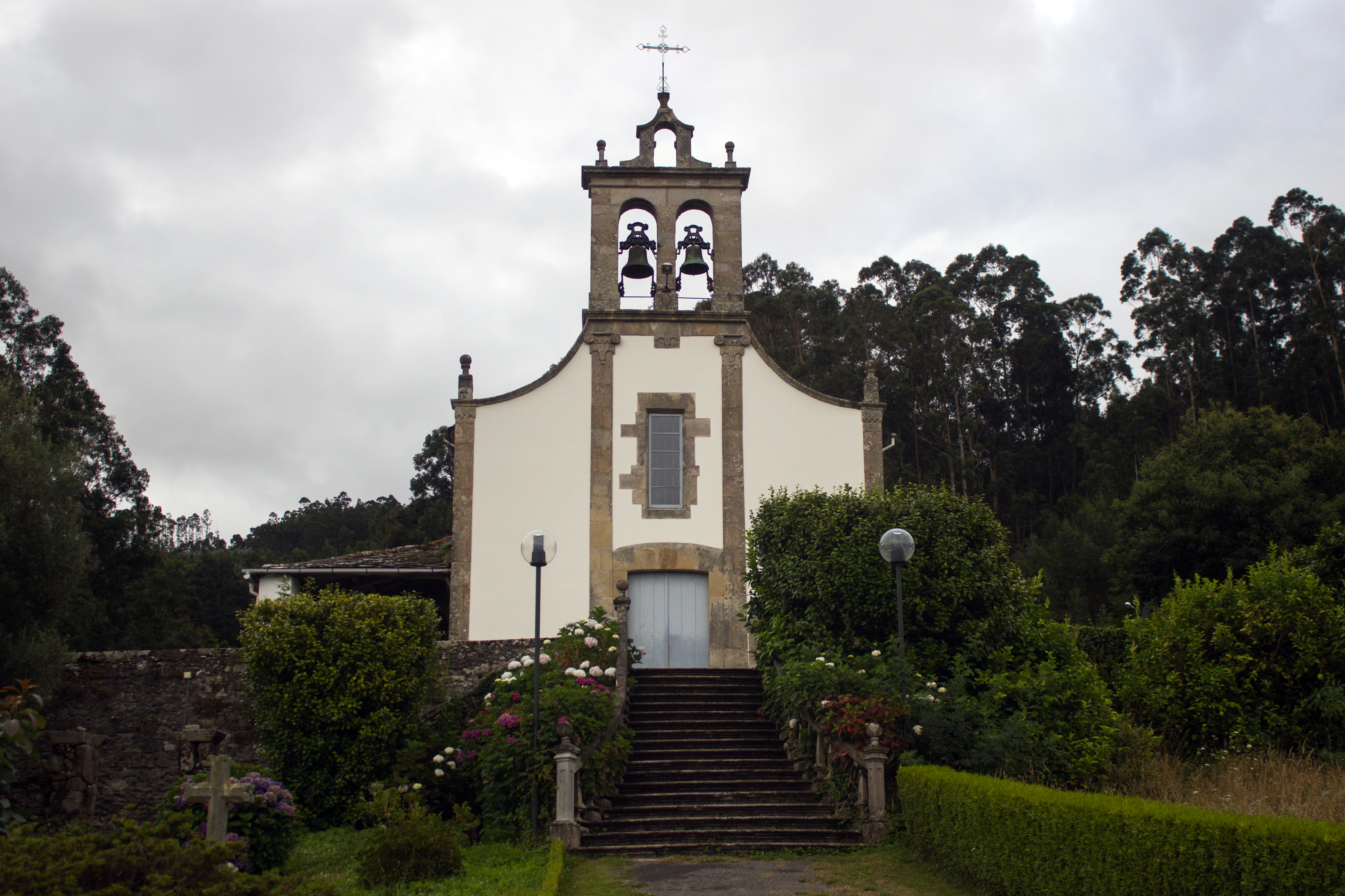 Igrexa de Santa María de Magazos no concello de Viveiro.